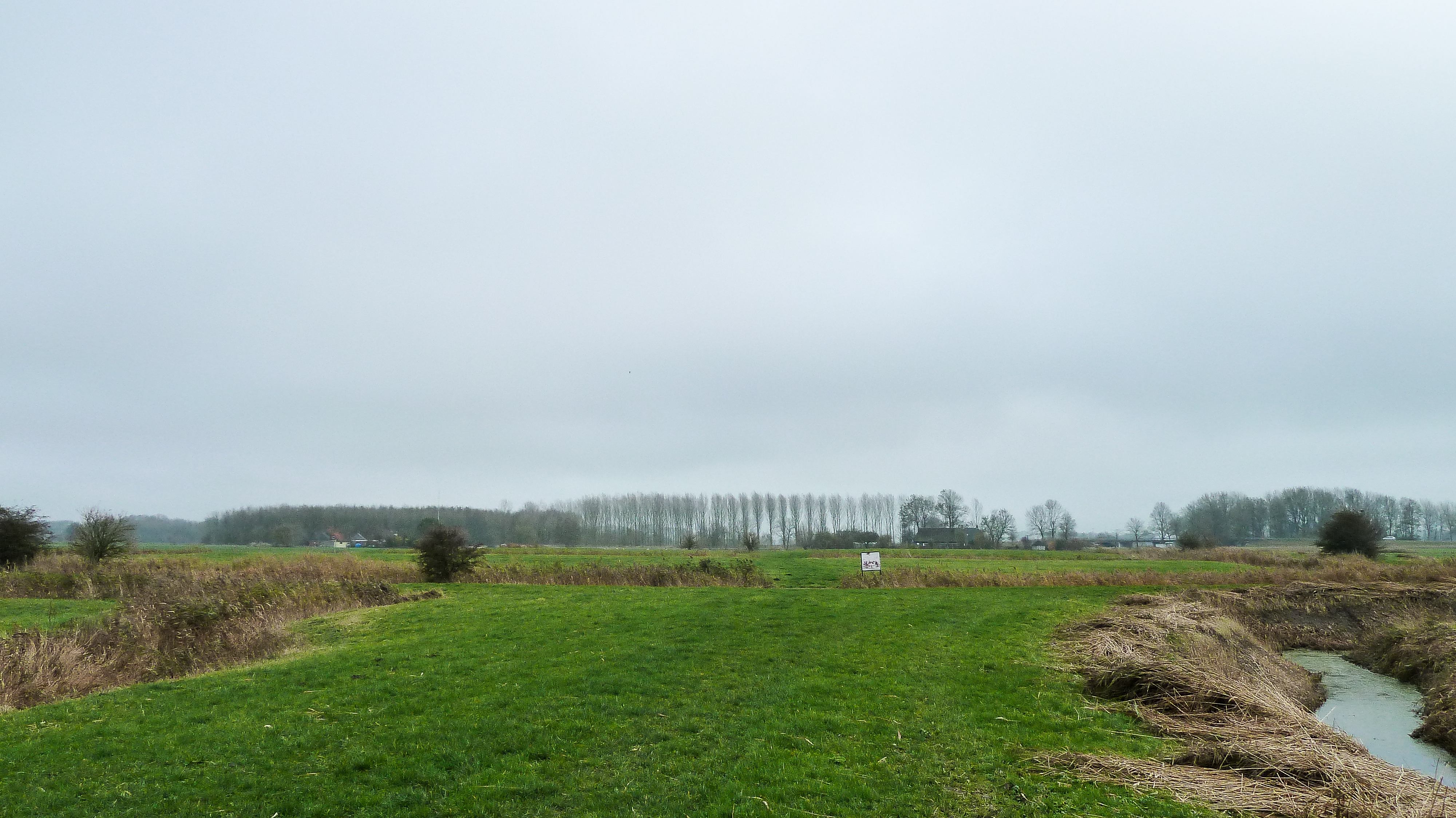 Overzicht borgterreinen Tammingahuizen